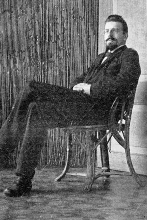 Als student (mei 1899). Foto gemaakt door Van der Leeuws vriend Adama van Scheltema